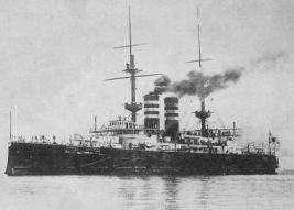 戦艦三笠